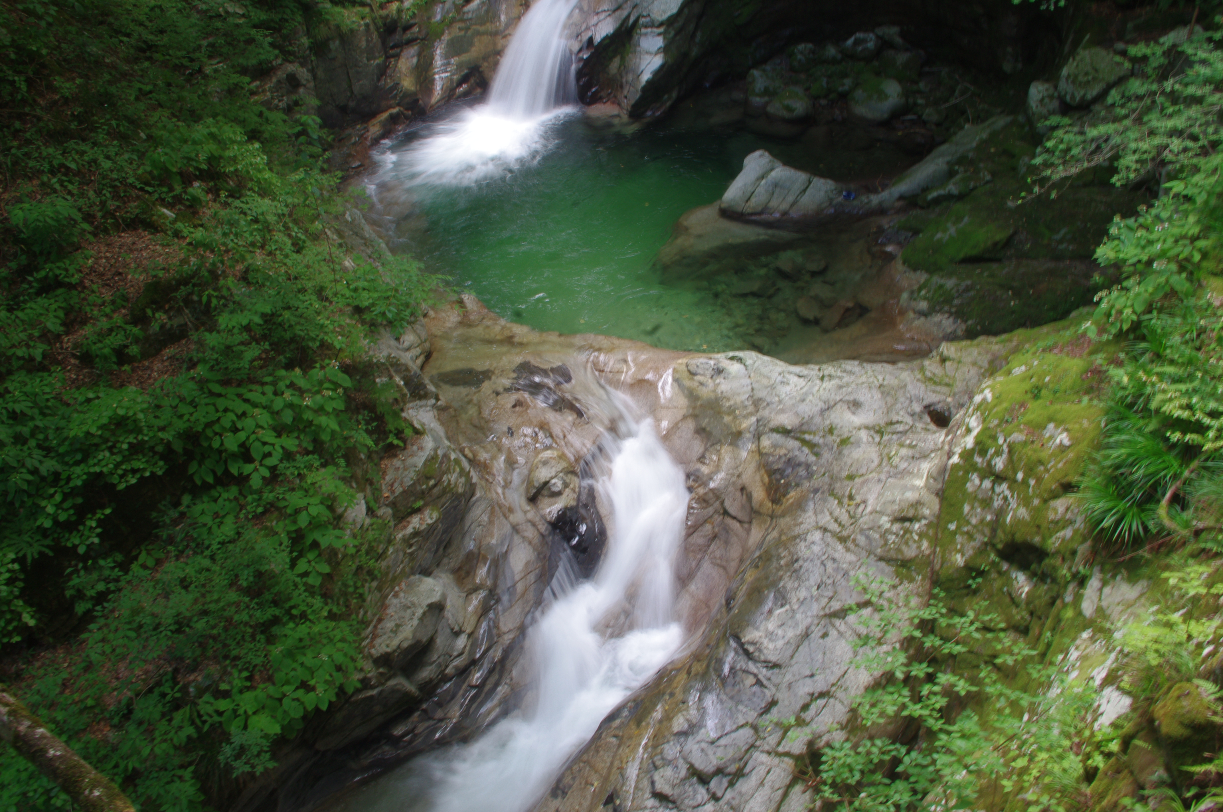 虻川渓谷の大明神淵